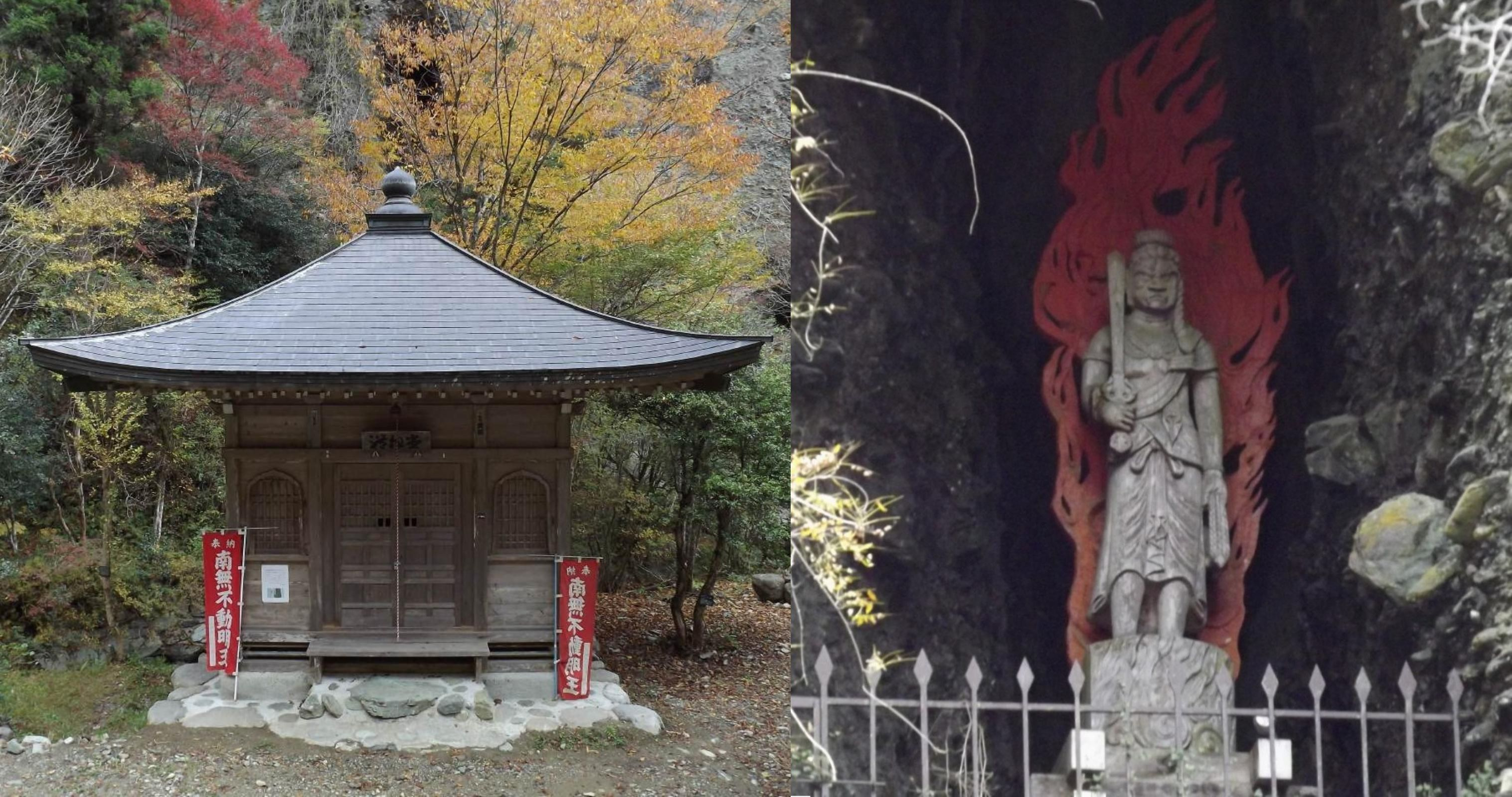 古岩屋の不動堂